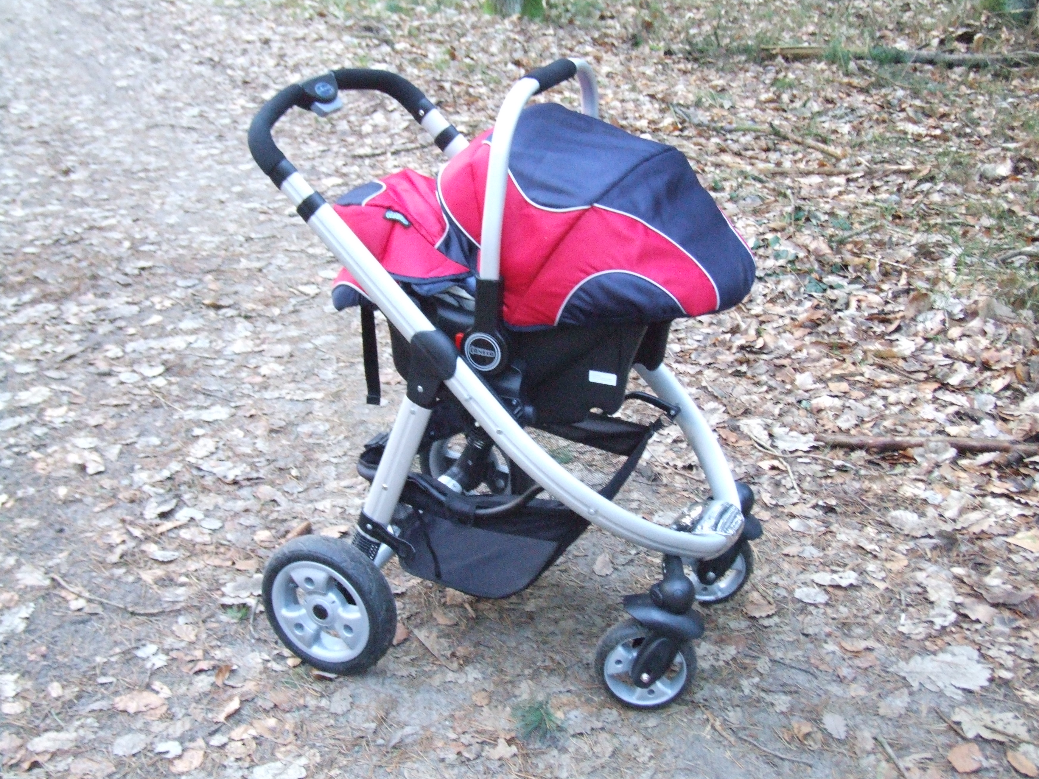 wózek dziecięcyen:pram